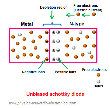 Schottky dioodi tööpõhimõte